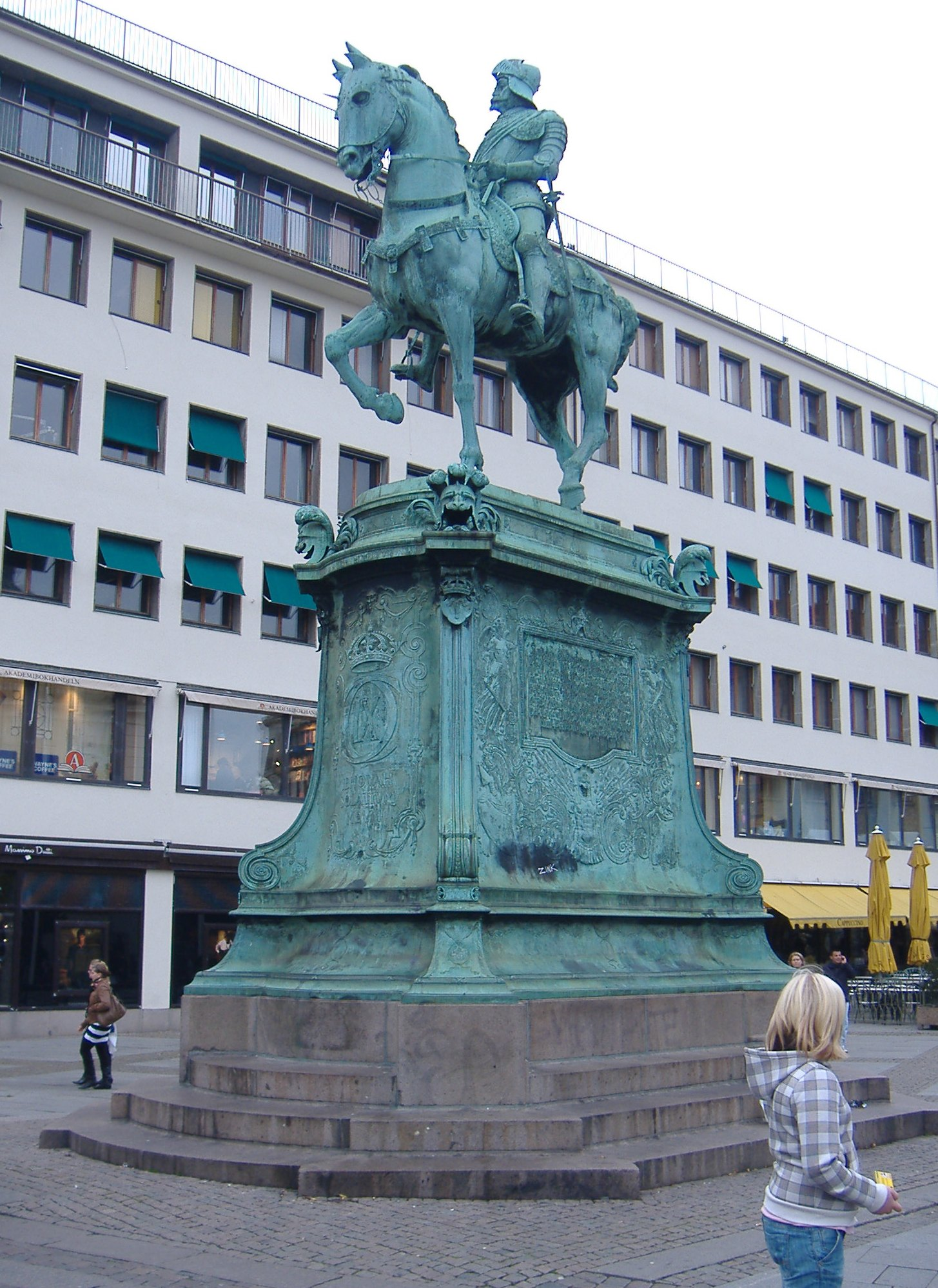 פסל של קרל התשיעי מלך שבדיה, בעיר גטבורג. בחזית הפסל הכיתוב "Iehovah Solativm Mevm" - באל נשים מבטחנו.